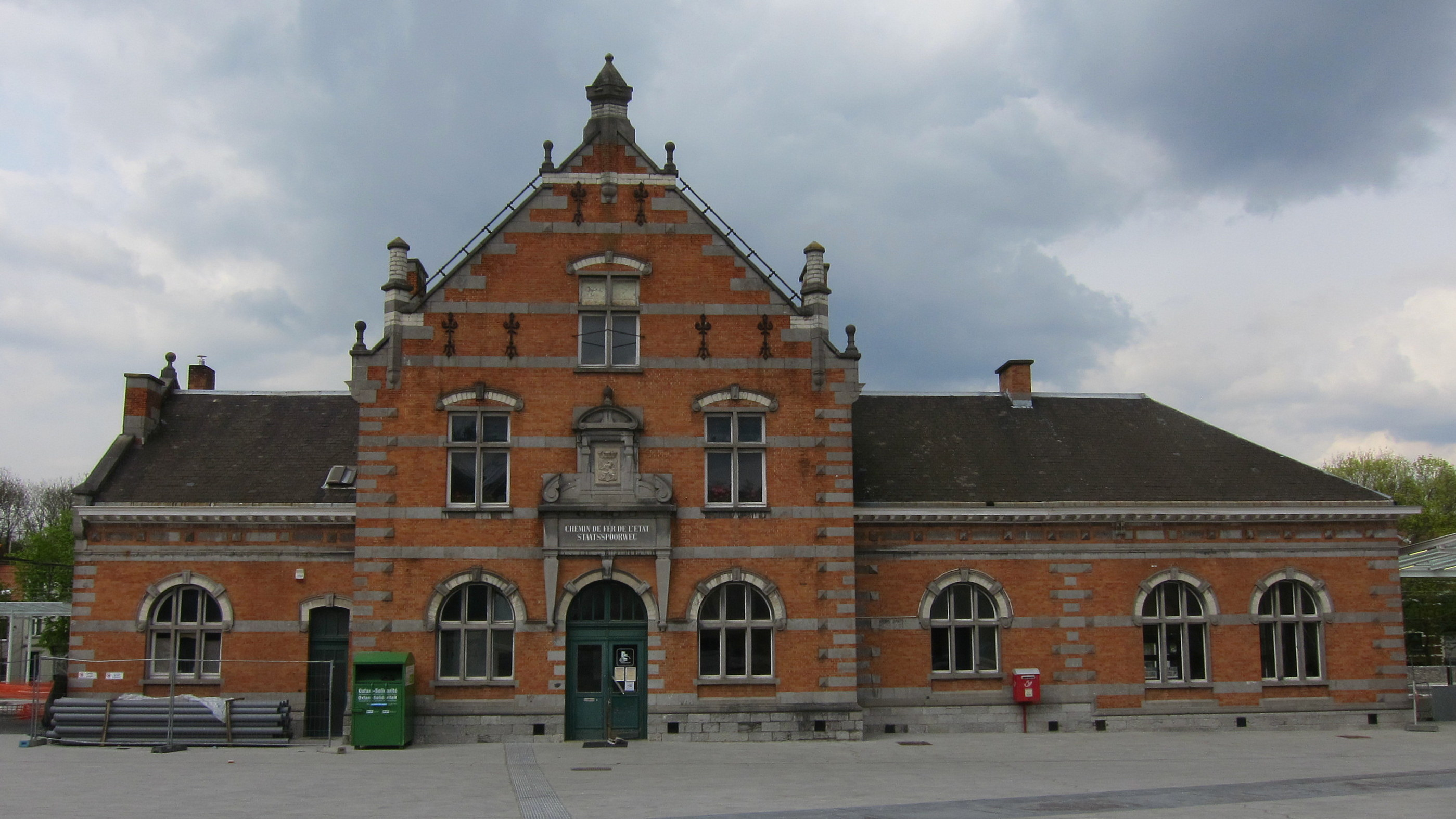 Jette treinstation 27-04-2013 16-30-21 This photo of immovable heritage has been taken in the Brussels Capital Region